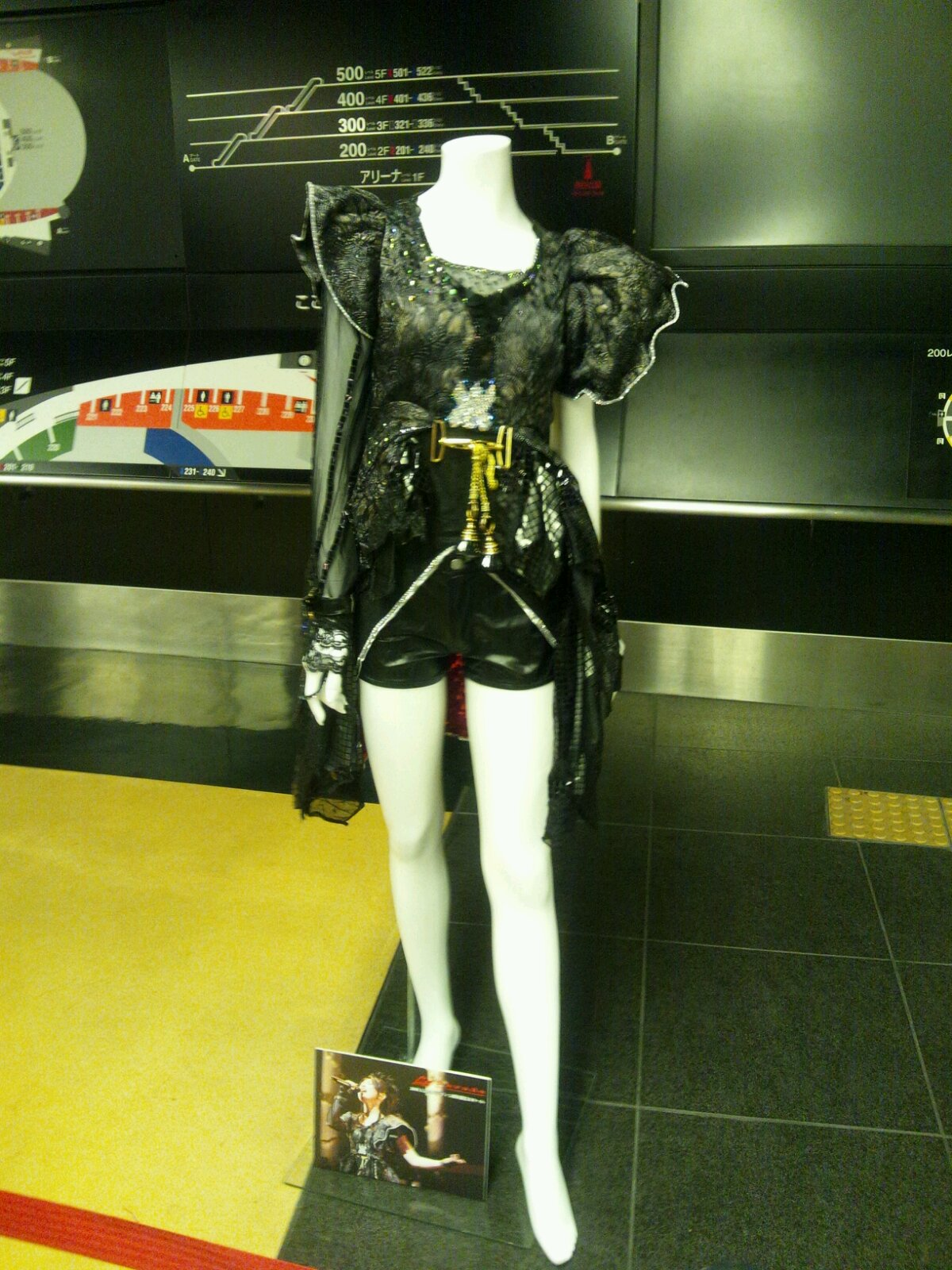 アニメロミックス Presents Minori Chihara Birthday Live 2012 supported by JOYSOUND 衣装展覧会より 『Minori Chihara Live Tour 2009 〜Parade〜』の衣装。